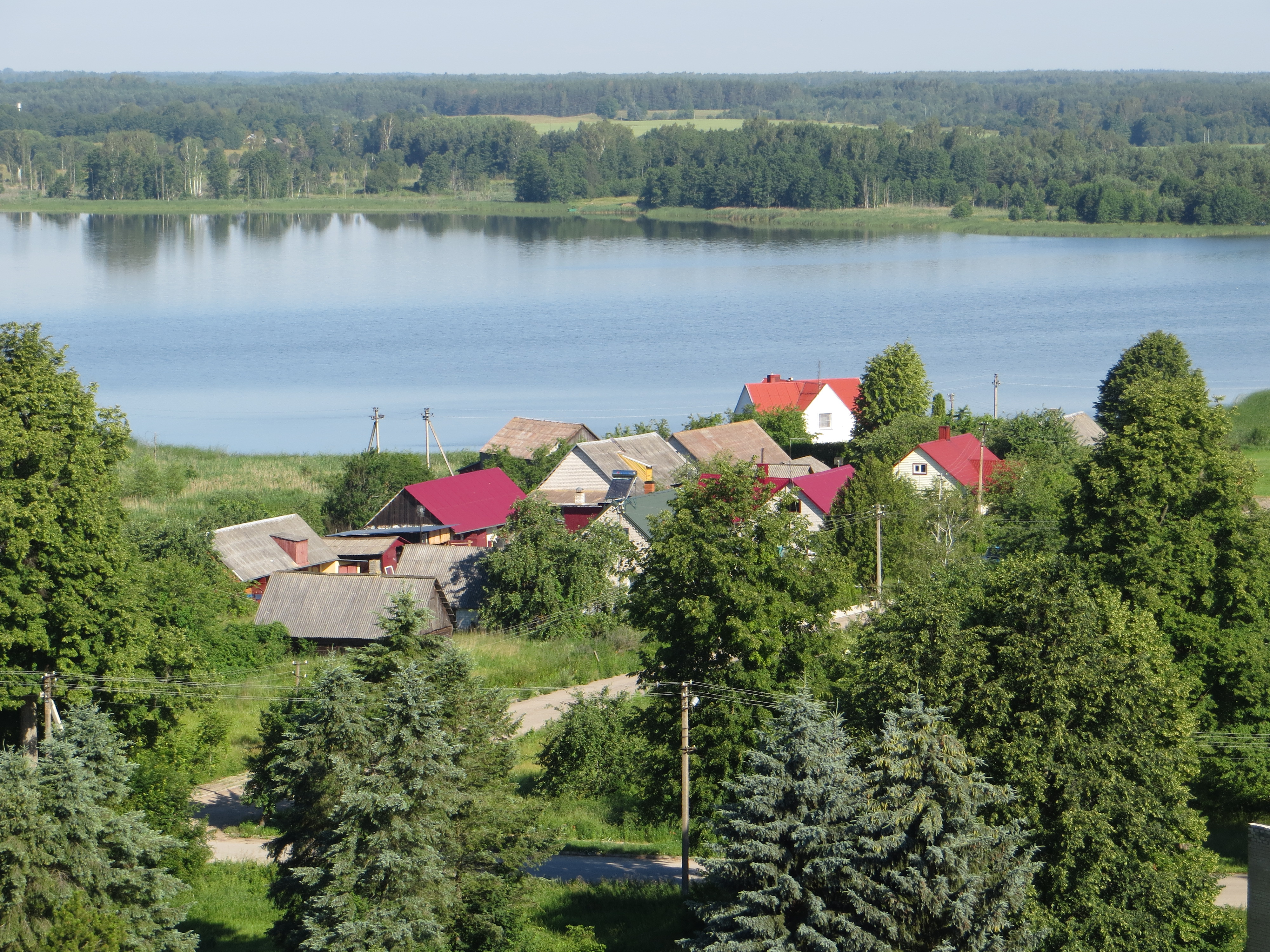 Kančėnai, Lithuania